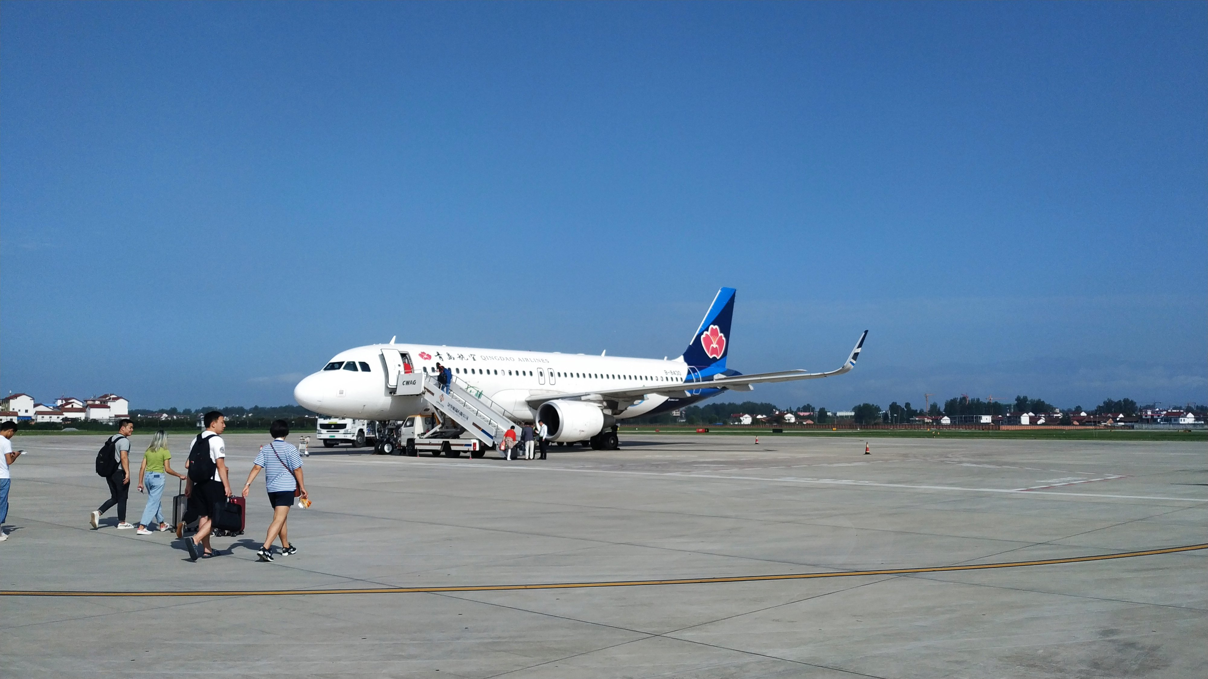 中文（中国大陆）: 青岛航空的A320